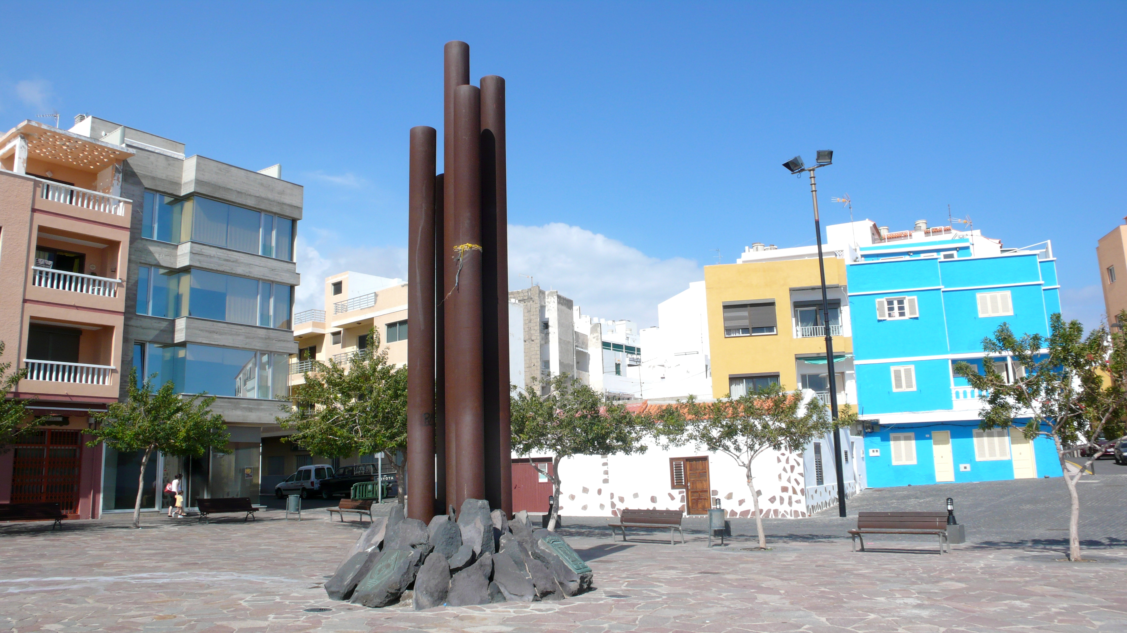 Puerto de Güímar: monumento al Radioaficionado. Originalmente estaba realizado en cemento. Los cilindros representan los cinco continentes.